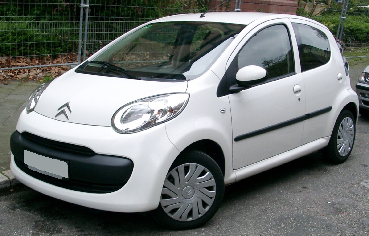 Citroën C1